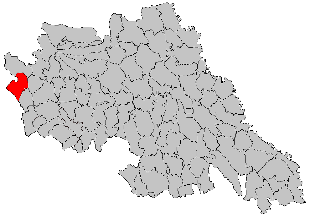 Categorie:Hărţi ale judeţului Iaşi